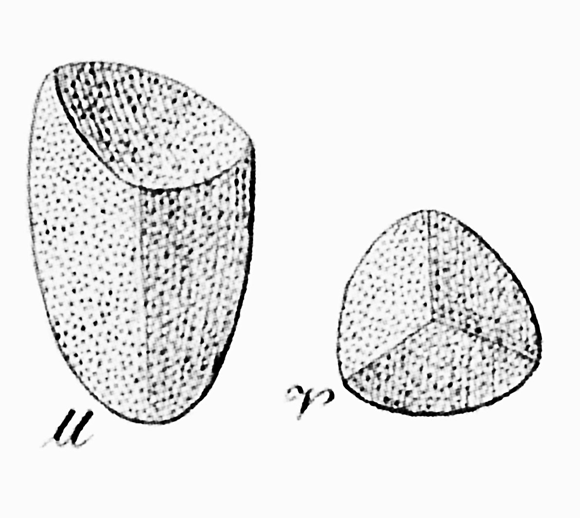 Franciscea confertifolia = Brunfelsia brasiliensis